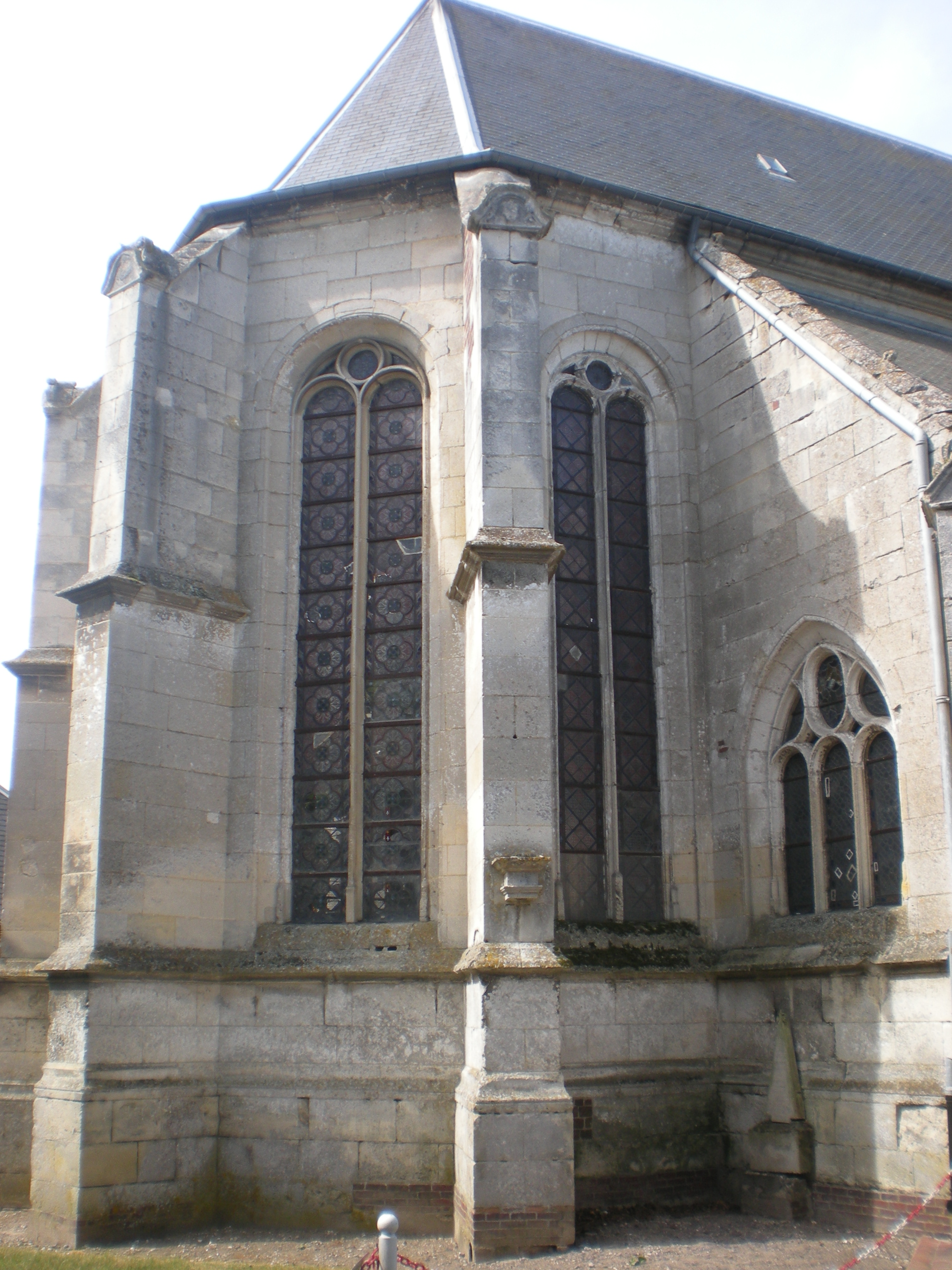 le chevet de l'église st martin d'étouy